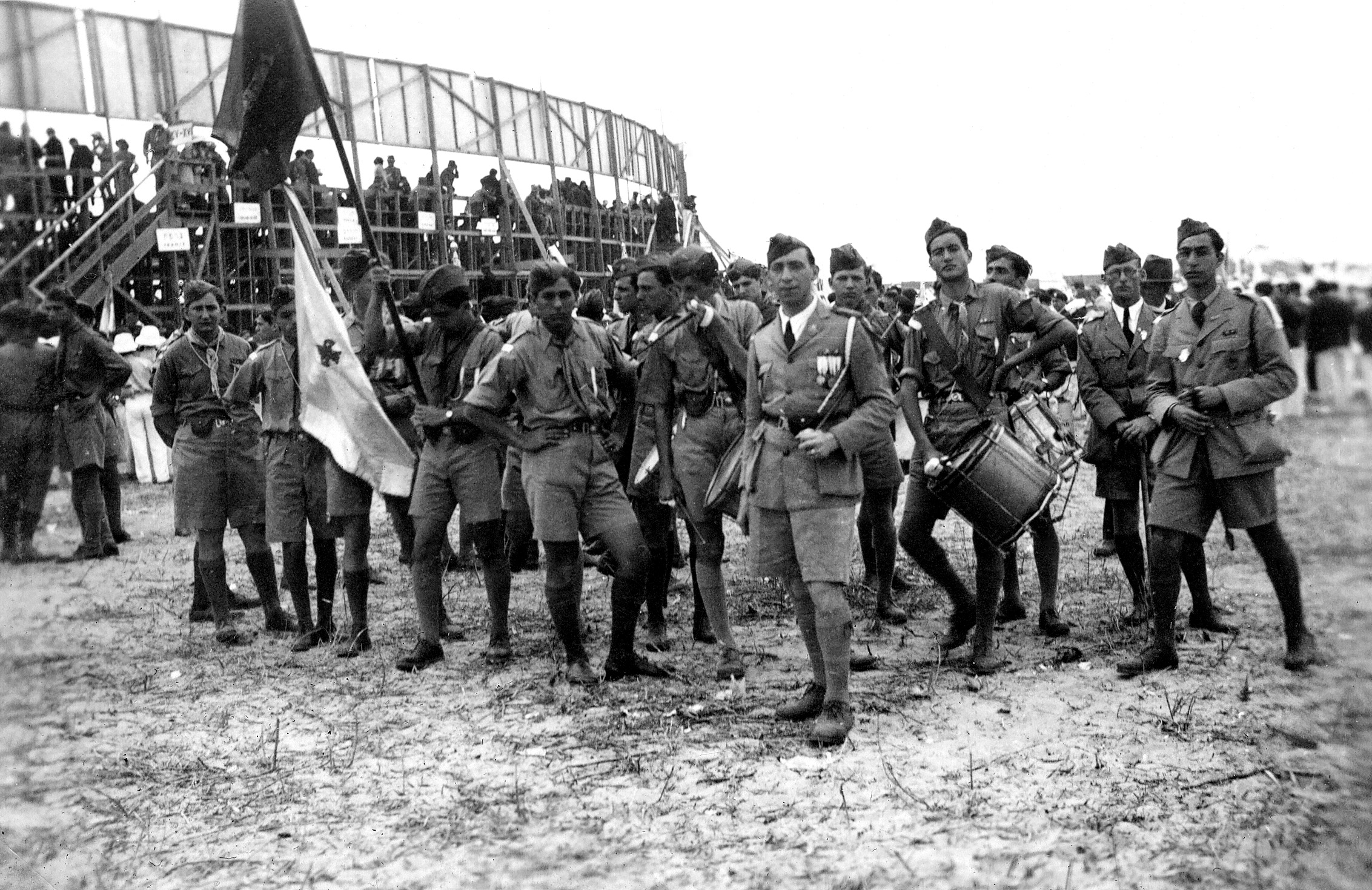 אוסף דוד עופר - המכביה השניה ; פריט מספר 20